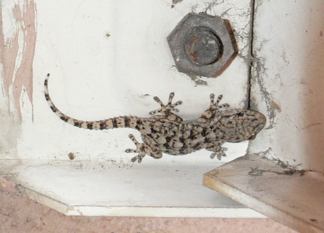 A common house gecko (juvenil)